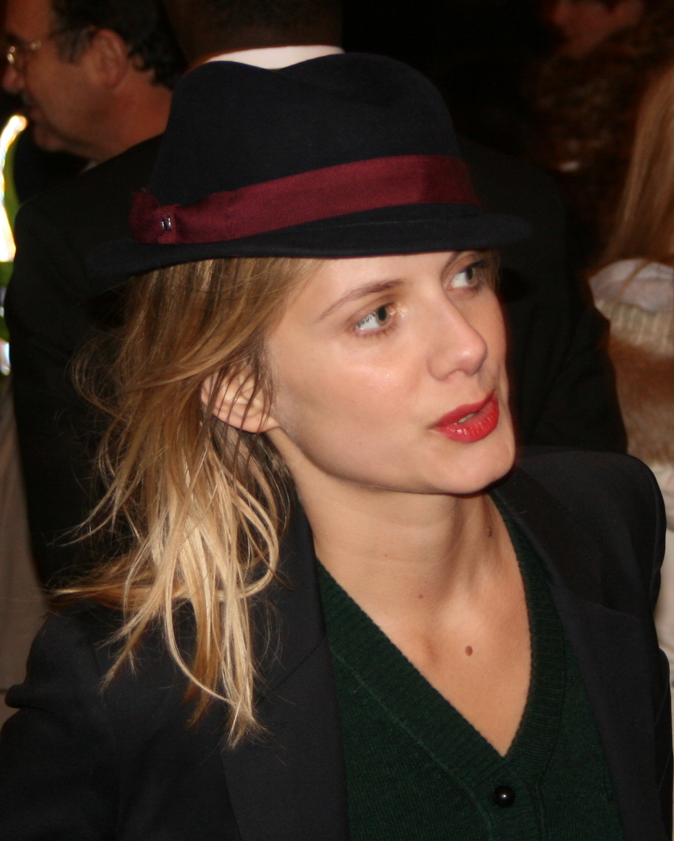 French actress Mélanie Laurent